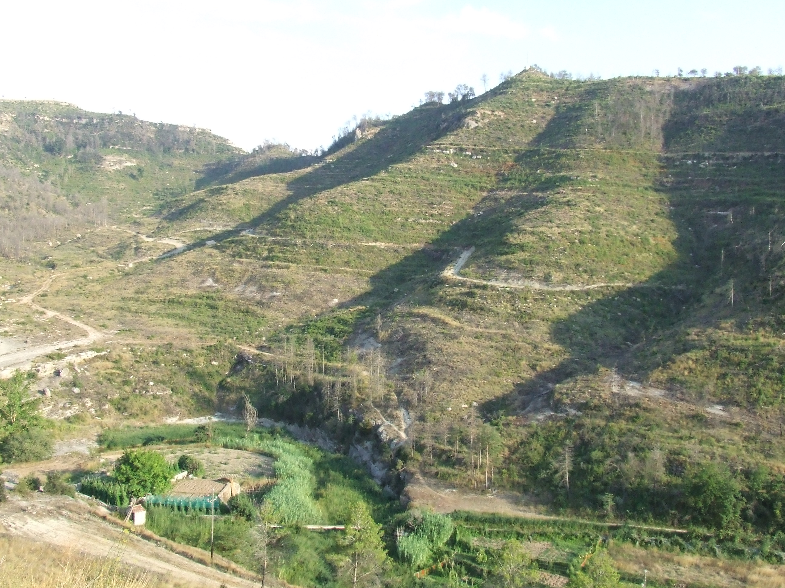 La Baga de Saladic i el Sot de l'Arç (Monistrol de Calders, Moianès)